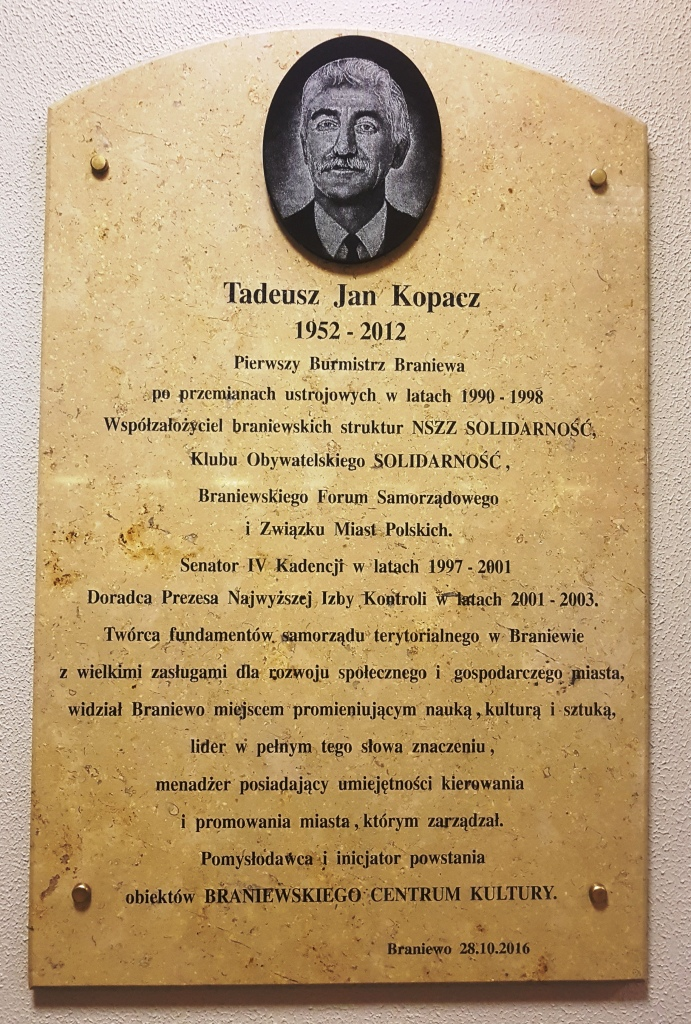 Tadeusz Kopacz Braniewo